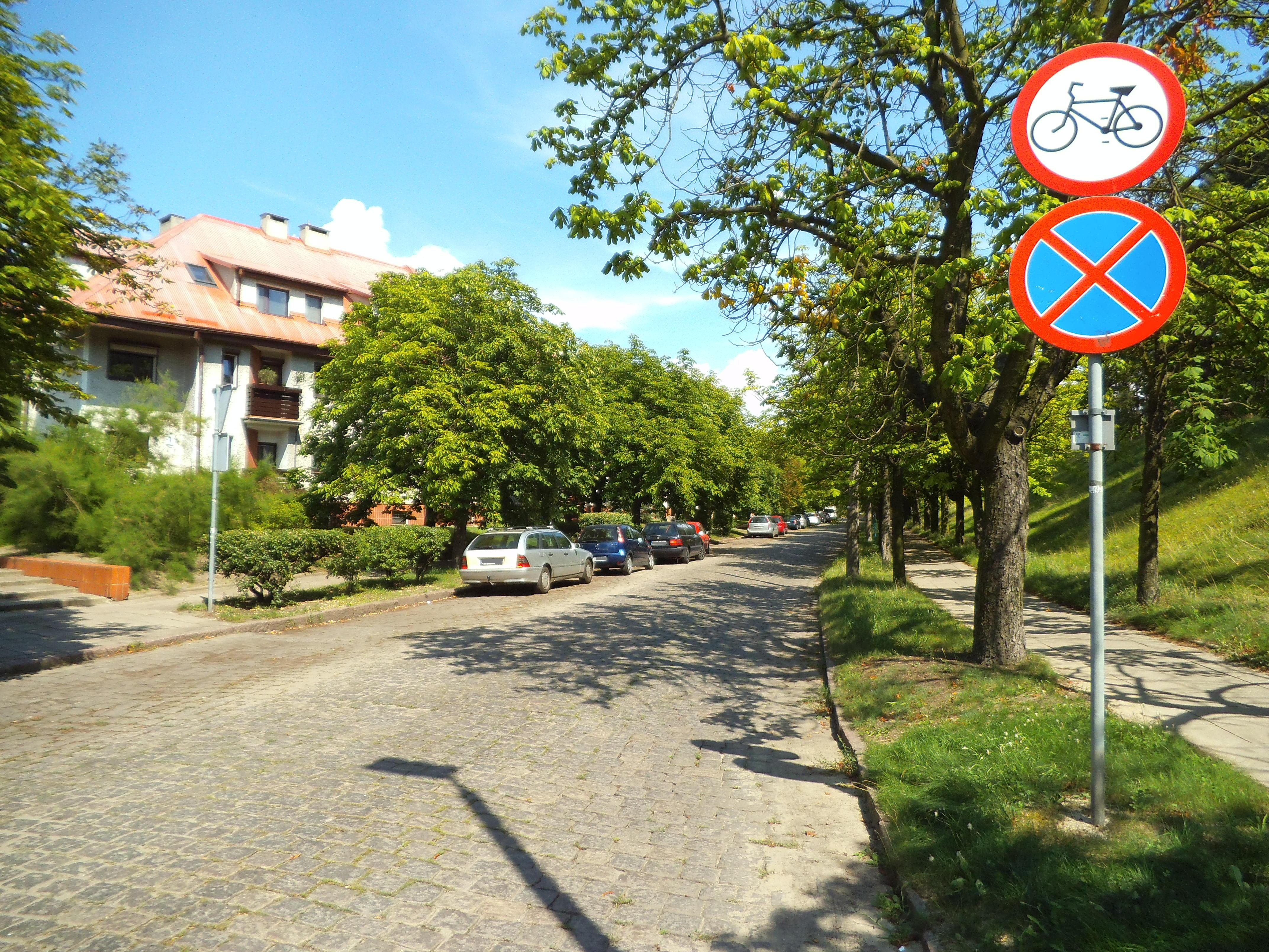 Ulica Balonowa w Toruniu